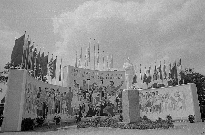 Original image description from the Deutsche Fotothek Statue von Stalin auf dem Gelände der Fachmesse